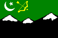 Summary Drapeau de la principauté de Hunza Source Shiva-Nataraja Statut 2004, Gérald Anfossi Catégorie:Drapeau de principauté des Indes